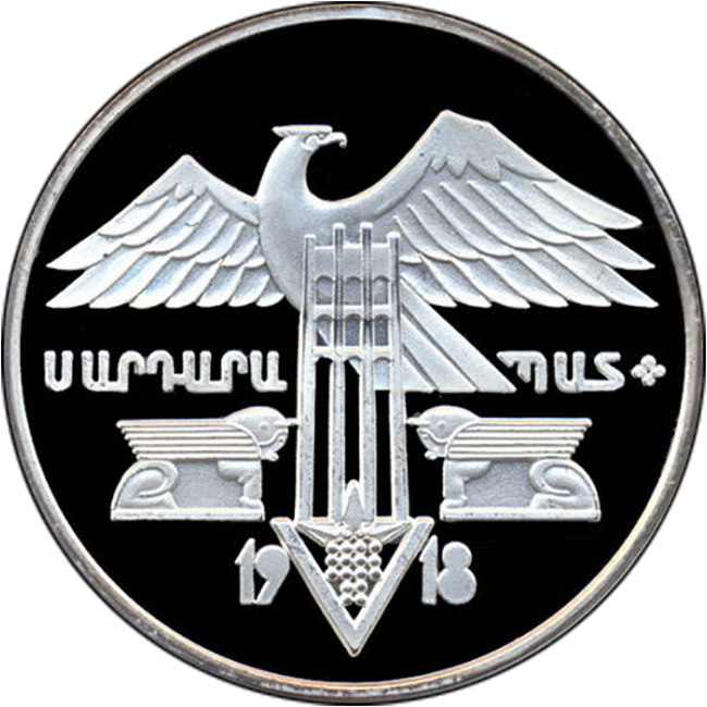 Памятная монета Армении 1994 года, посвящённая Сардарапатскому сражению 1918 - 25 драм - серебро 999